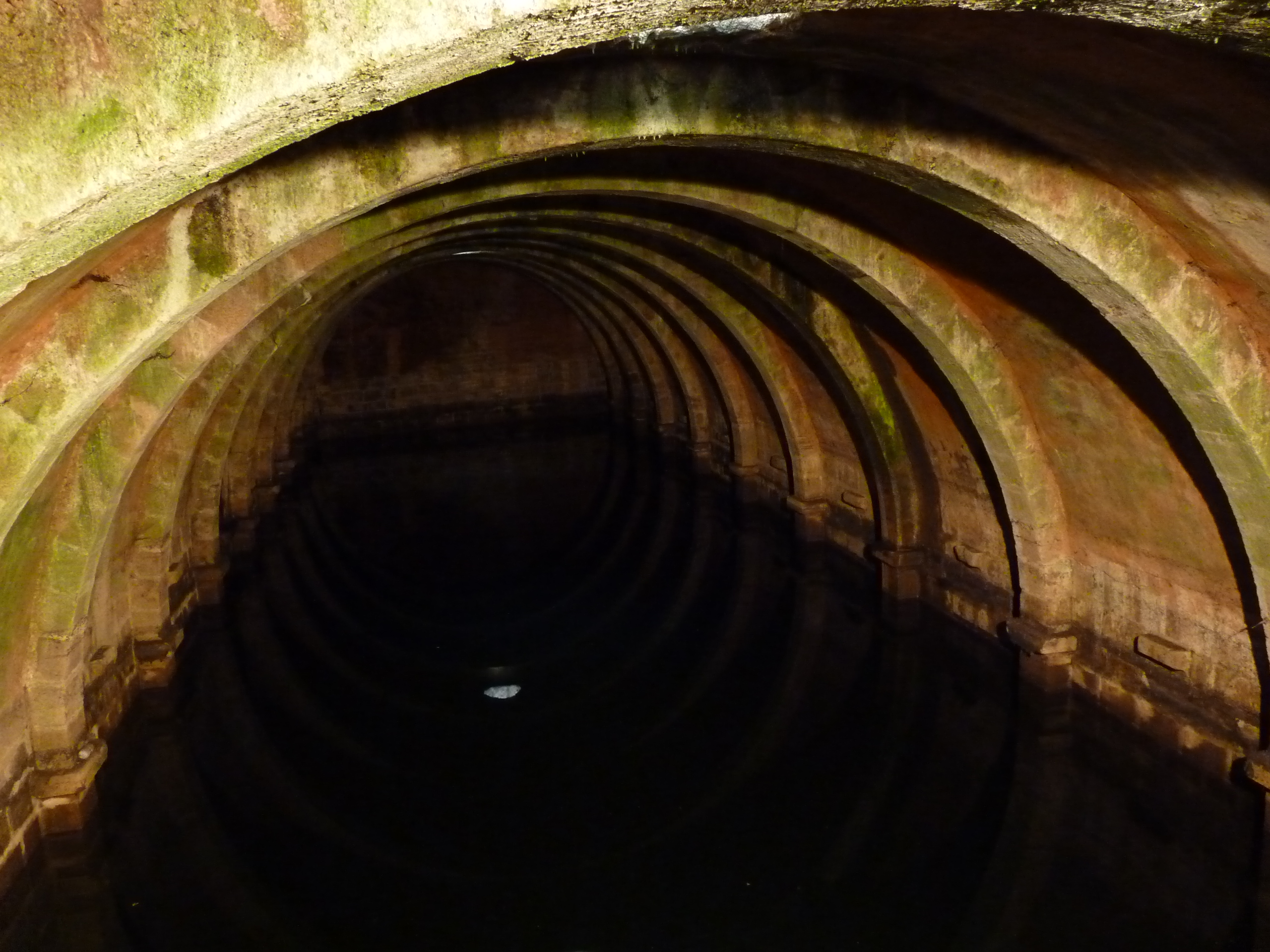 Castelo de Marvão This file was uploaded for Wiki Loves Monuments in Portugal with the unique identifier 70363.